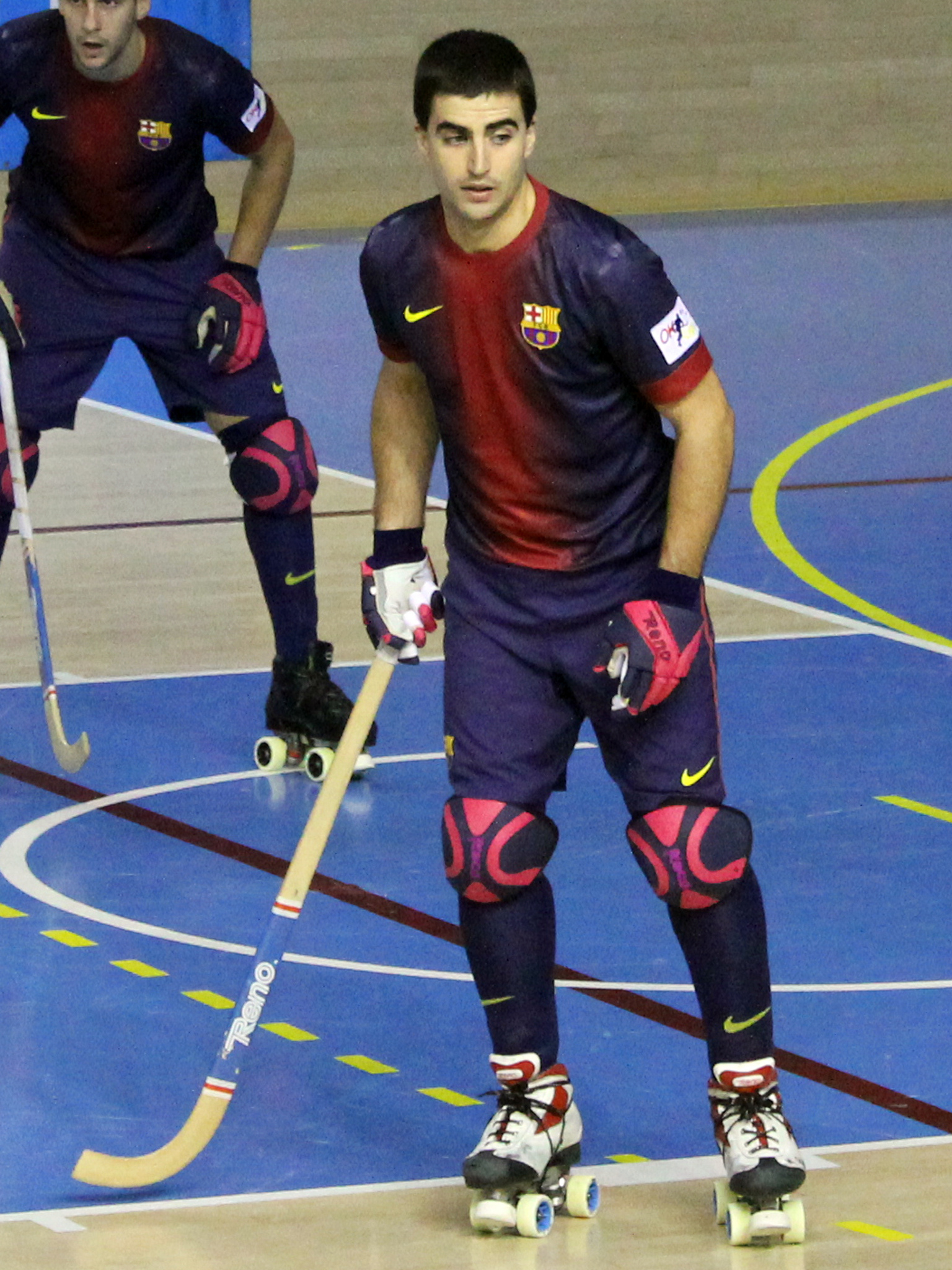 Foto realizada por Javier Segura (@castroquini)